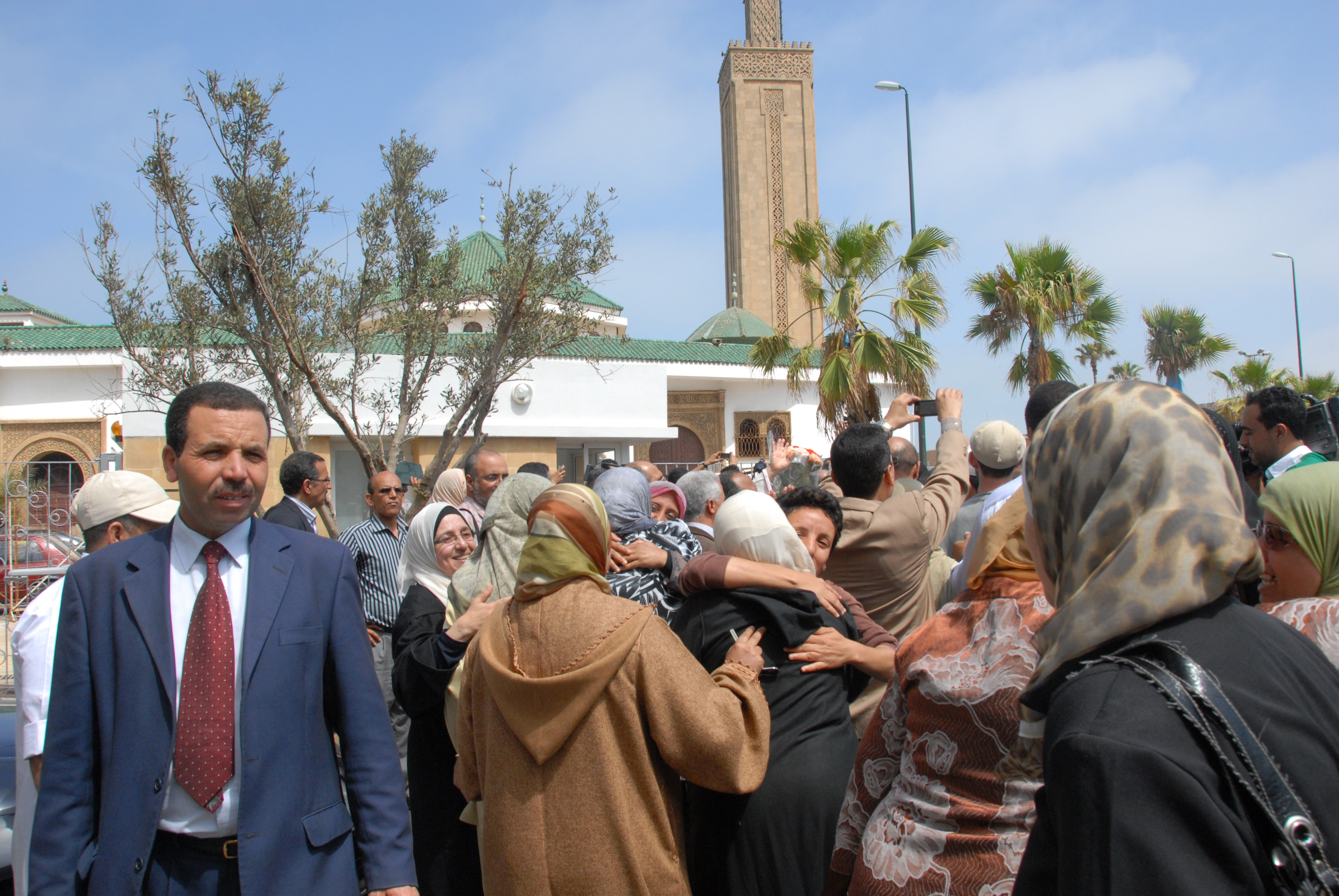 [Imrane Binoual] Families of Moroccan political prisoners celebrate the news of their loved ones' release. احتفال عائلات السجناء السياسيين بنبأ إطلاق سراح أحبائهم. Les familles des prisonniers politiques marocains célèbrent la nouvelle de la libération de leurs proches. Full story: القصة L'article